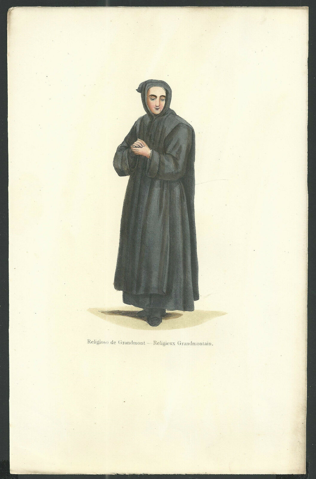 Moine de l'ordre de Grandmont. Gravure XIXe siècle.